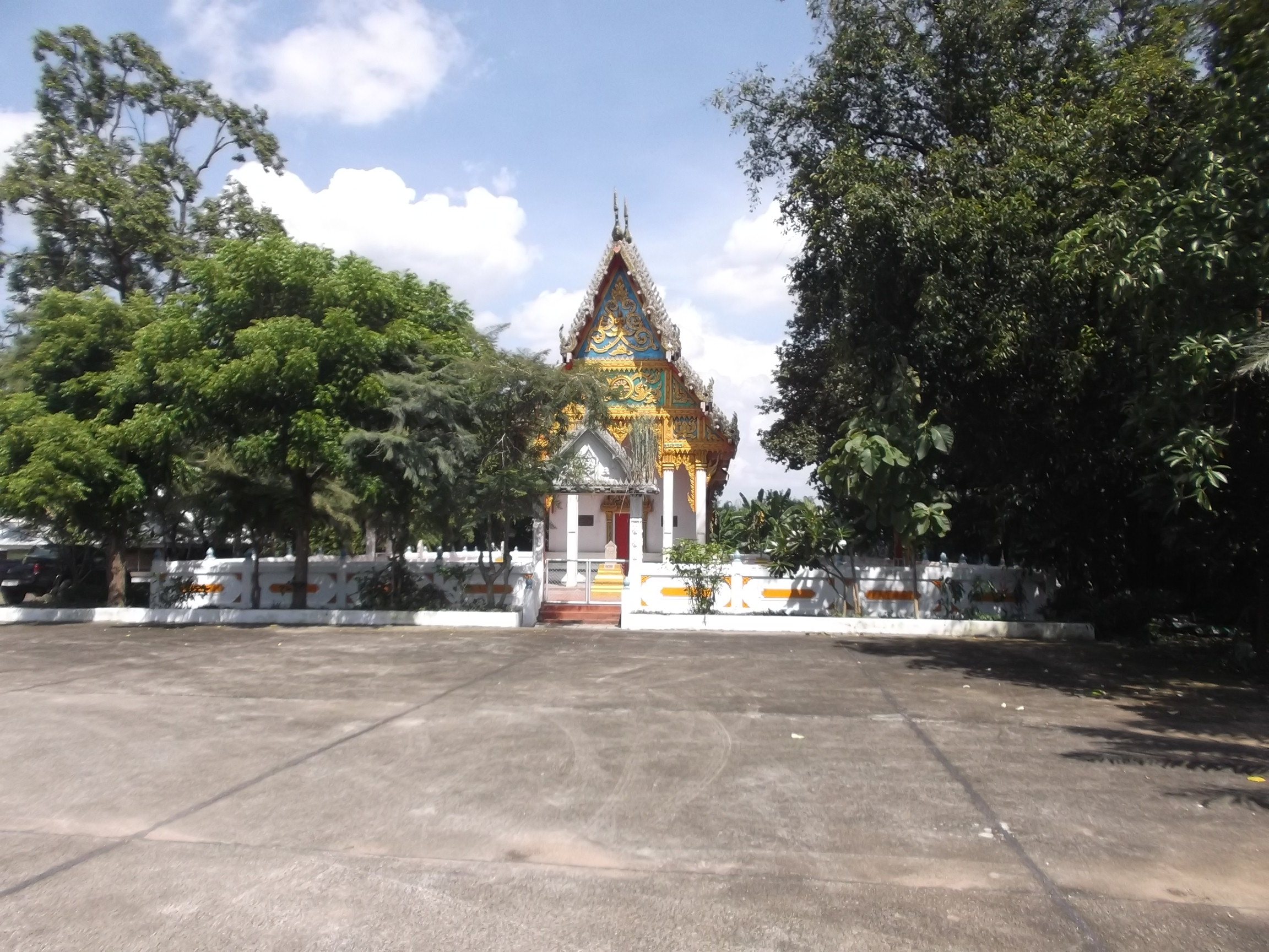 พระอุโบสถวัดศรีสัจจาวาส มีพระประธานประจำอุโบสถ ปางมารวิชัย ขนาดฐานหน้าตัก 39 นิ้ว สร้างเมื่อ พ.ศ. 2525